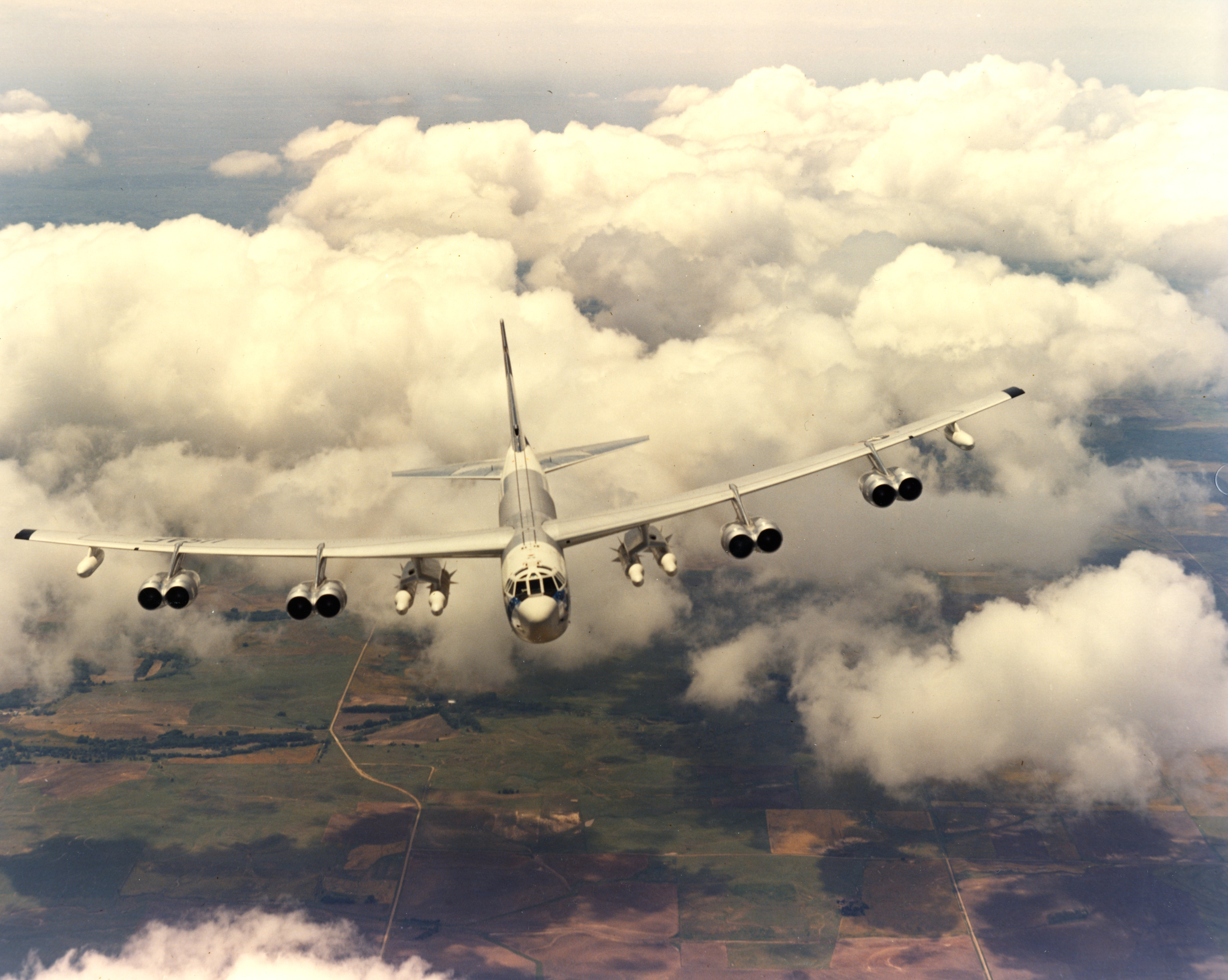 B-52H Skybolt flight testK7927